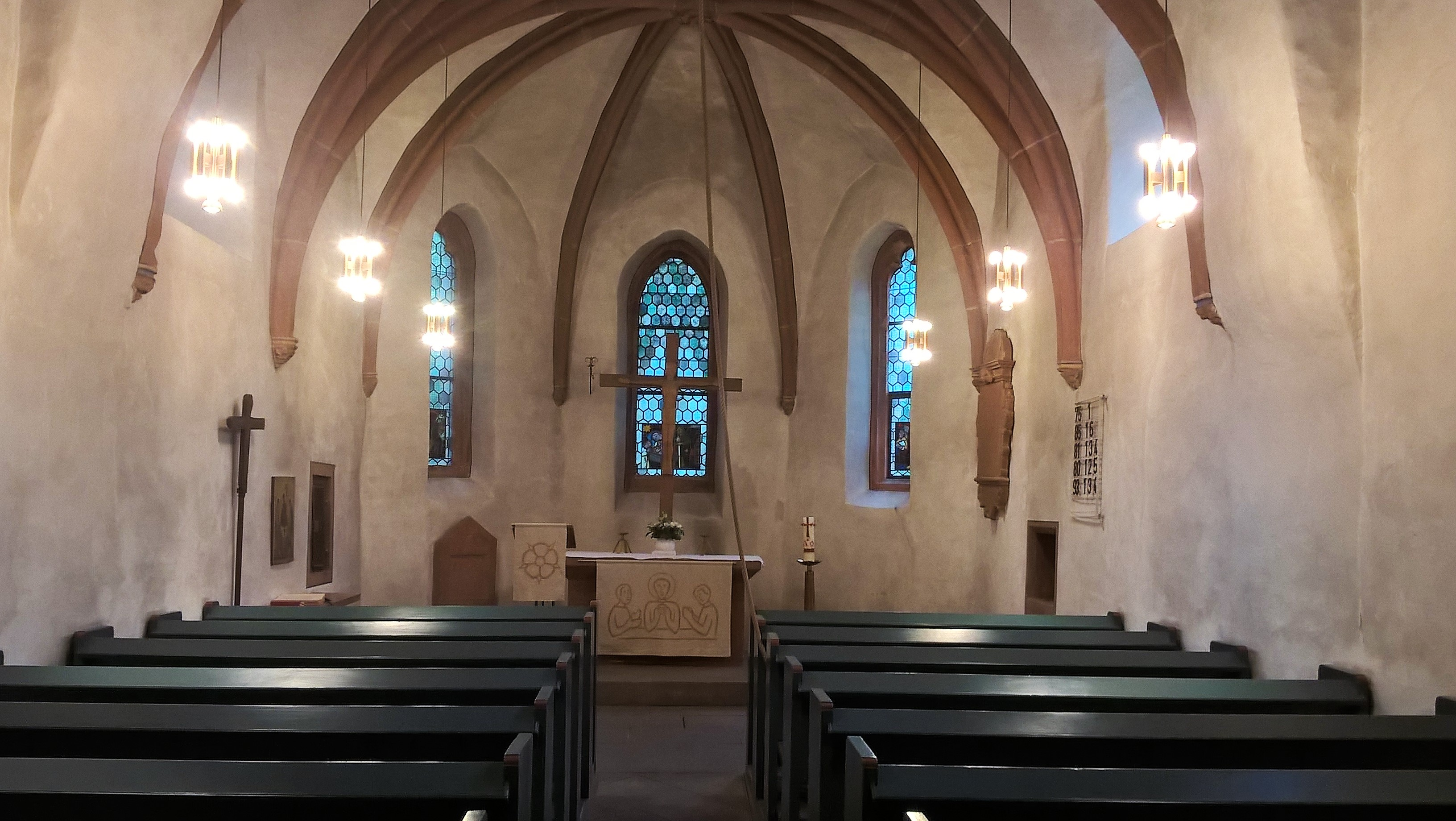 St. Jost in Marburg-Weidenhausen, Landkreis Marburg-Biedenkopf, Hessen, Deutschland